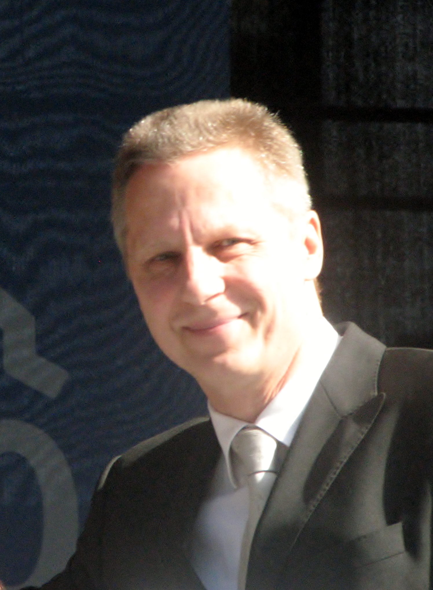 Vello Pähn esinemas Estonia maja juubelipidustustel